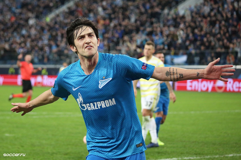 Сердар Азмун отмечает гол, забитый за футбольный клуб «Зенит», в матче 21 февраля 2019 года против турецкого футбольного клуба «Фенербахче»